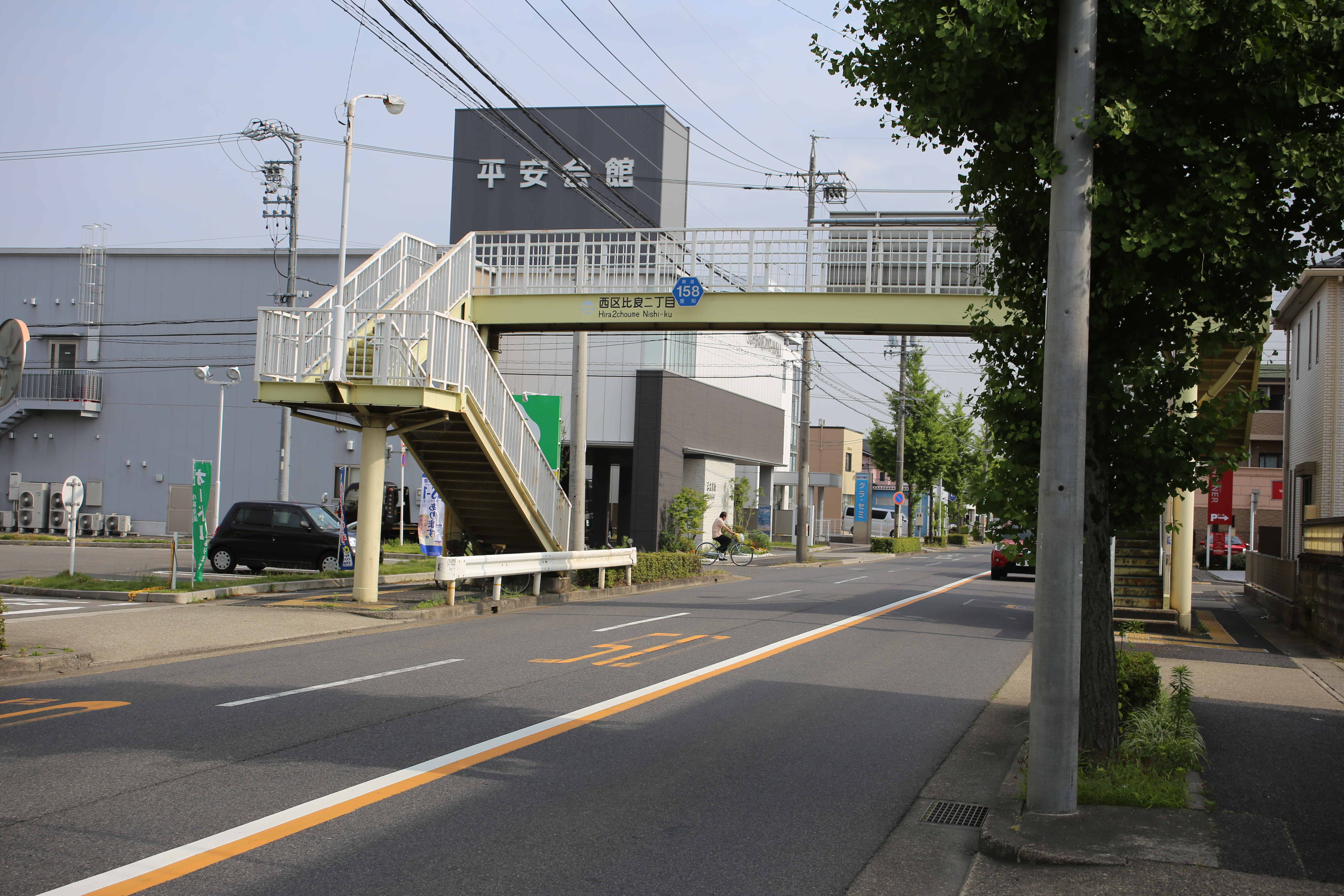 名古屋市西区比良二丁目の愛知県道158号小口名古屋線を北東側より撮影